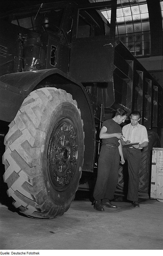 Original image description from the Deutsche FotothekWährend einer Besprechung neben einem Schwertransporter